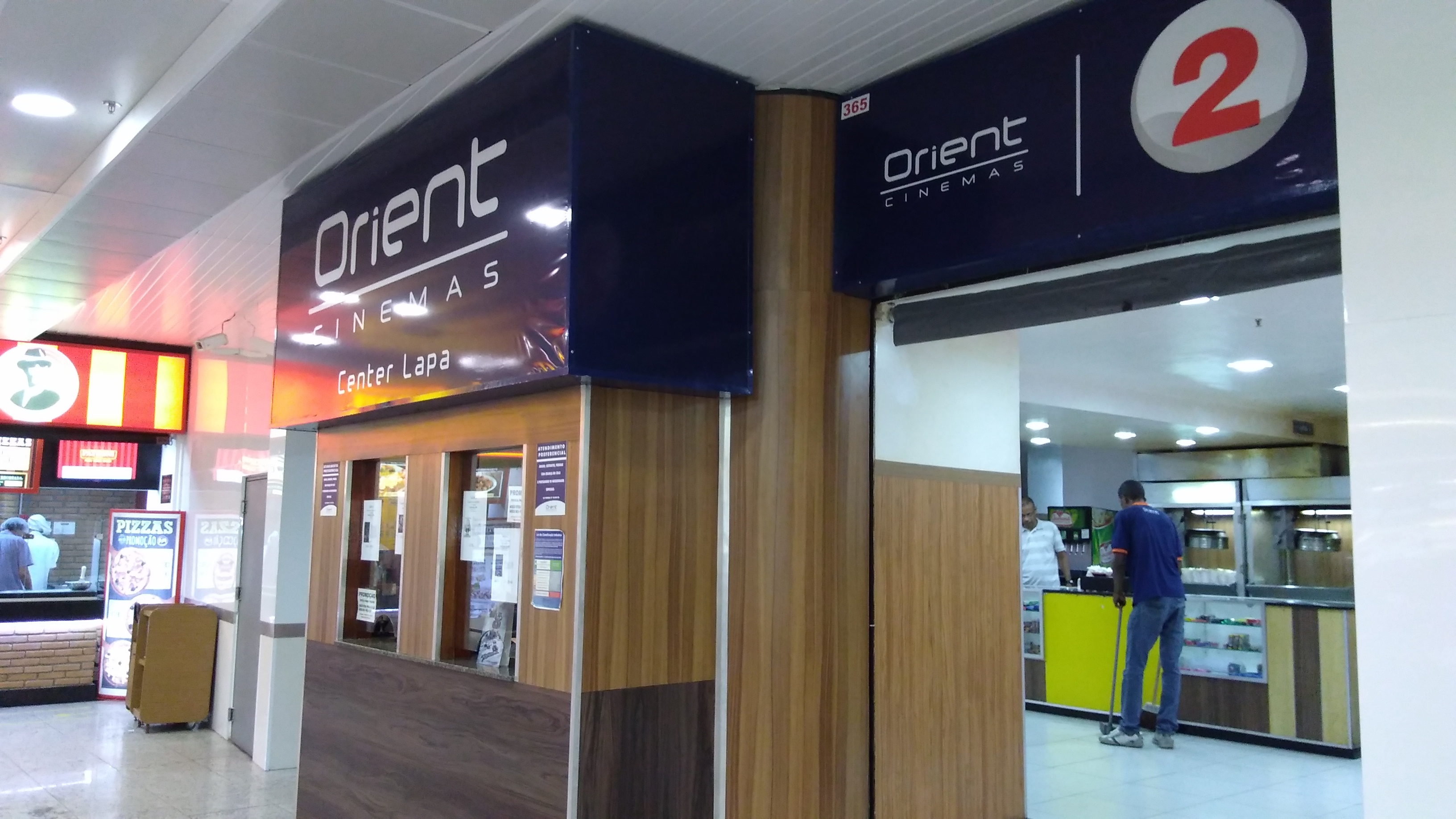 Vista lateral do Orient Cinemas Center Lapa, entrada da Sala 2